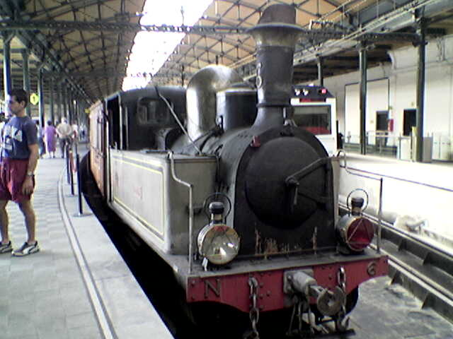 Locomotora Guipuzcoa de Asociación de Amigos del ferrocarril de Bilbao